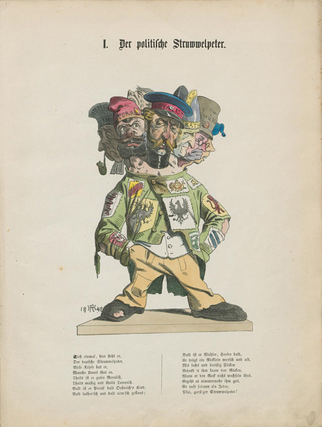 Illustration Der politische Struwwelpeter.